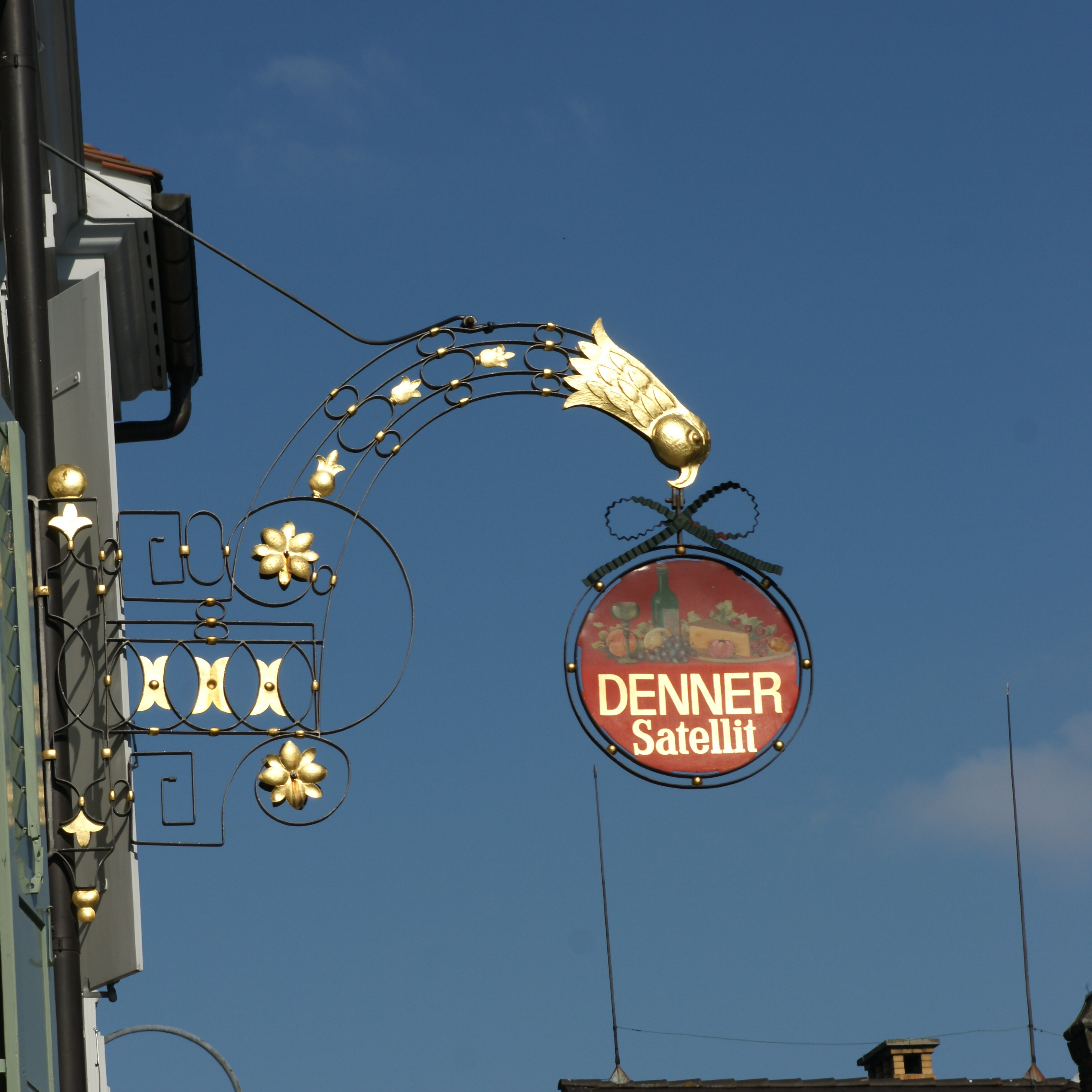 Wirtshausschild am Dorfplatz in Gais.